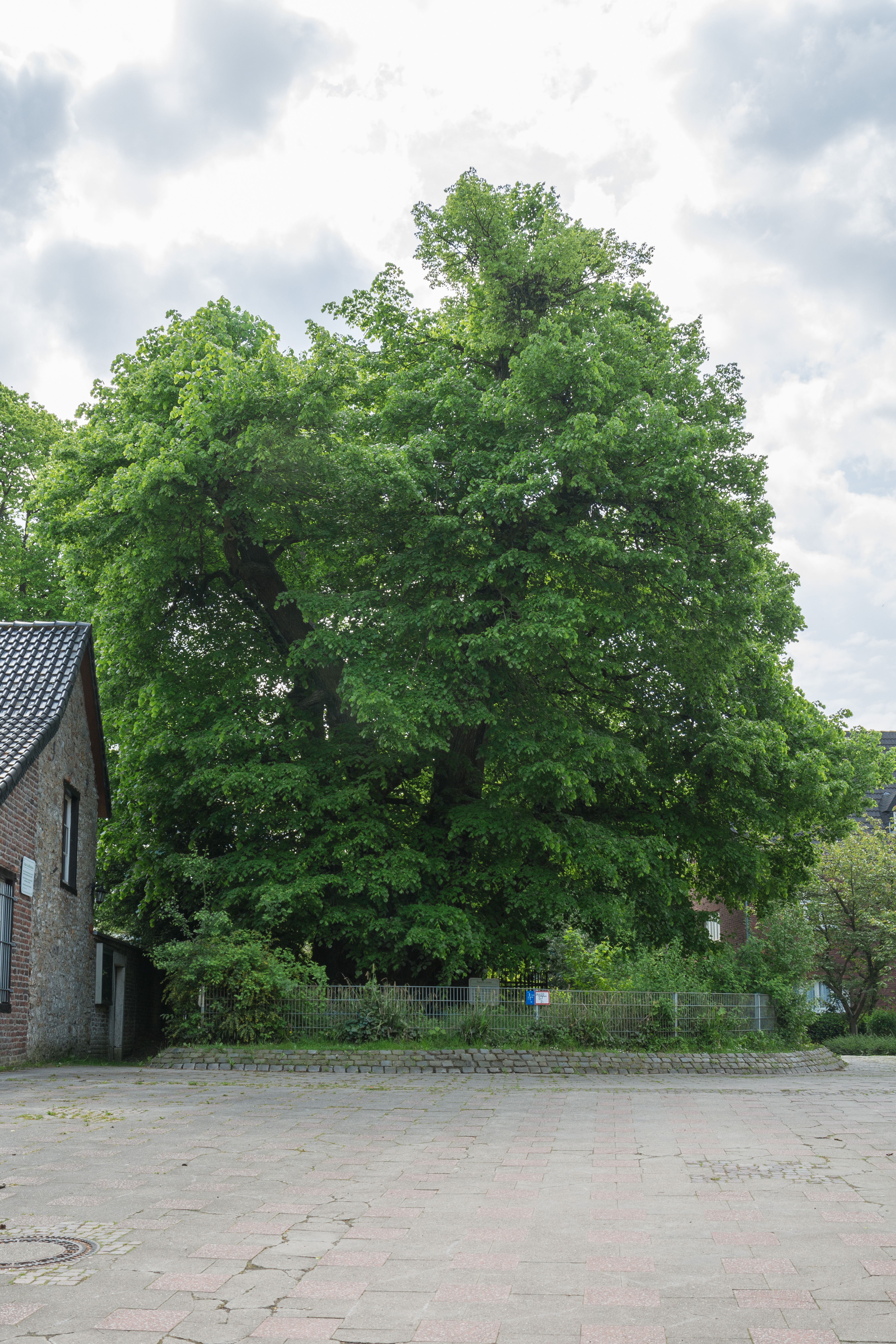 Blick auf die Forster Linde aus Richtung Kirchstraße